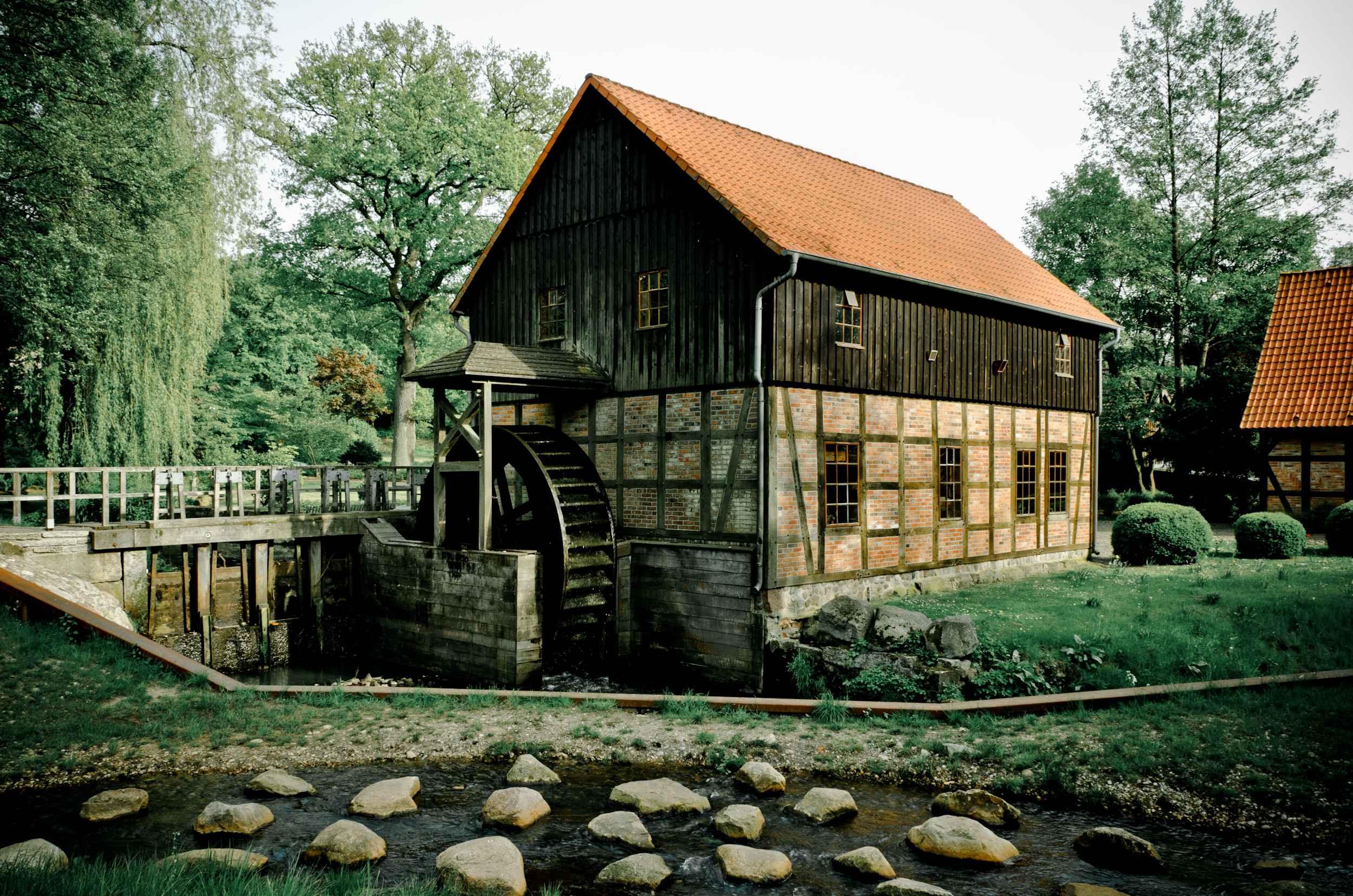 Die Cordinger Mühle an der Warnau in Benefeld (Lüneburger Heide, Deutschland)